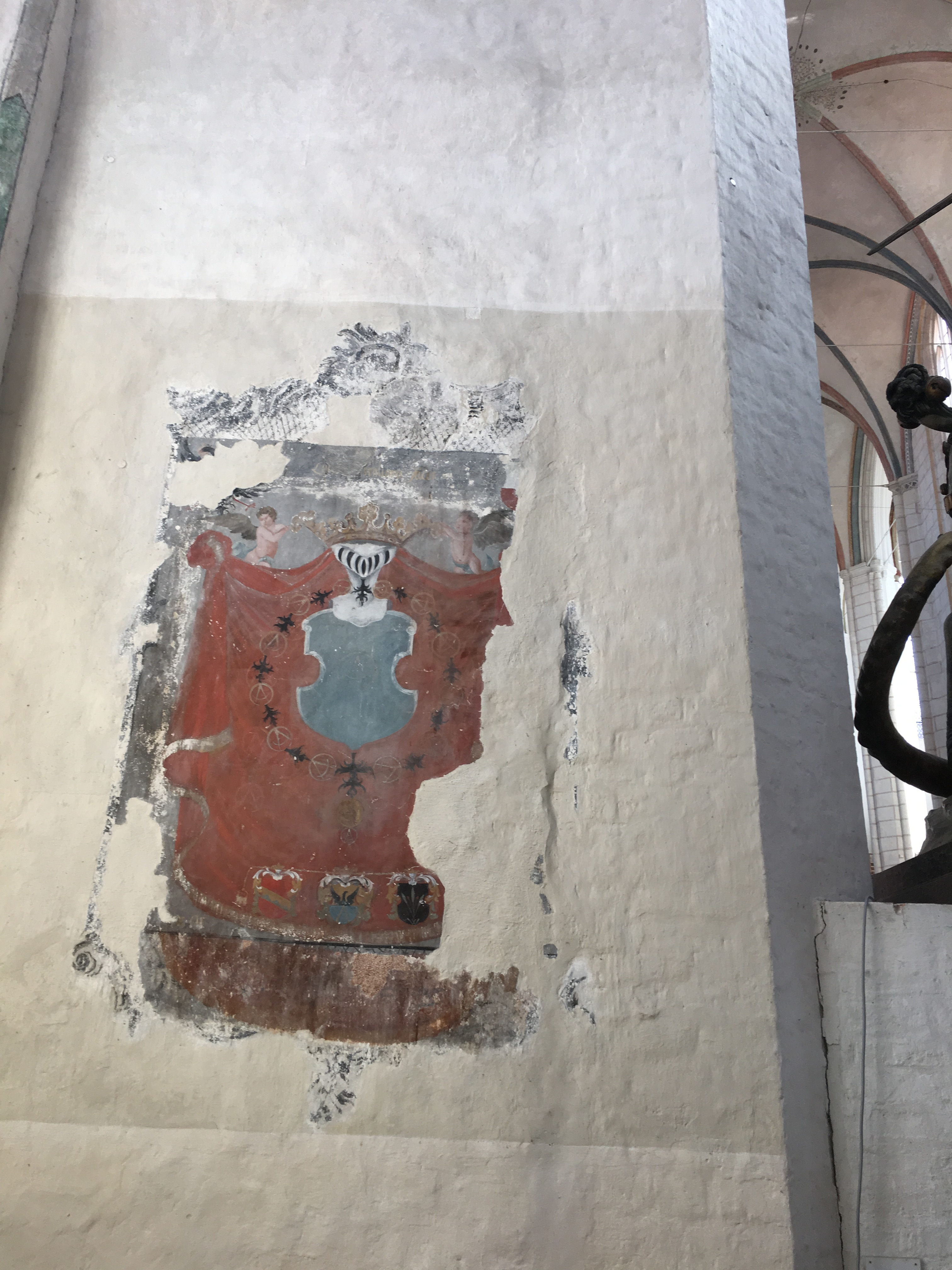 Fresco in der Zirklerkapelle der Katharinenkirche in Lübeck